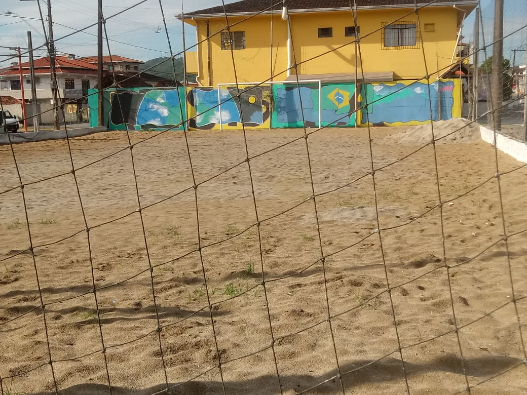 Campinho de areia (Área de lazer Tuiuti)